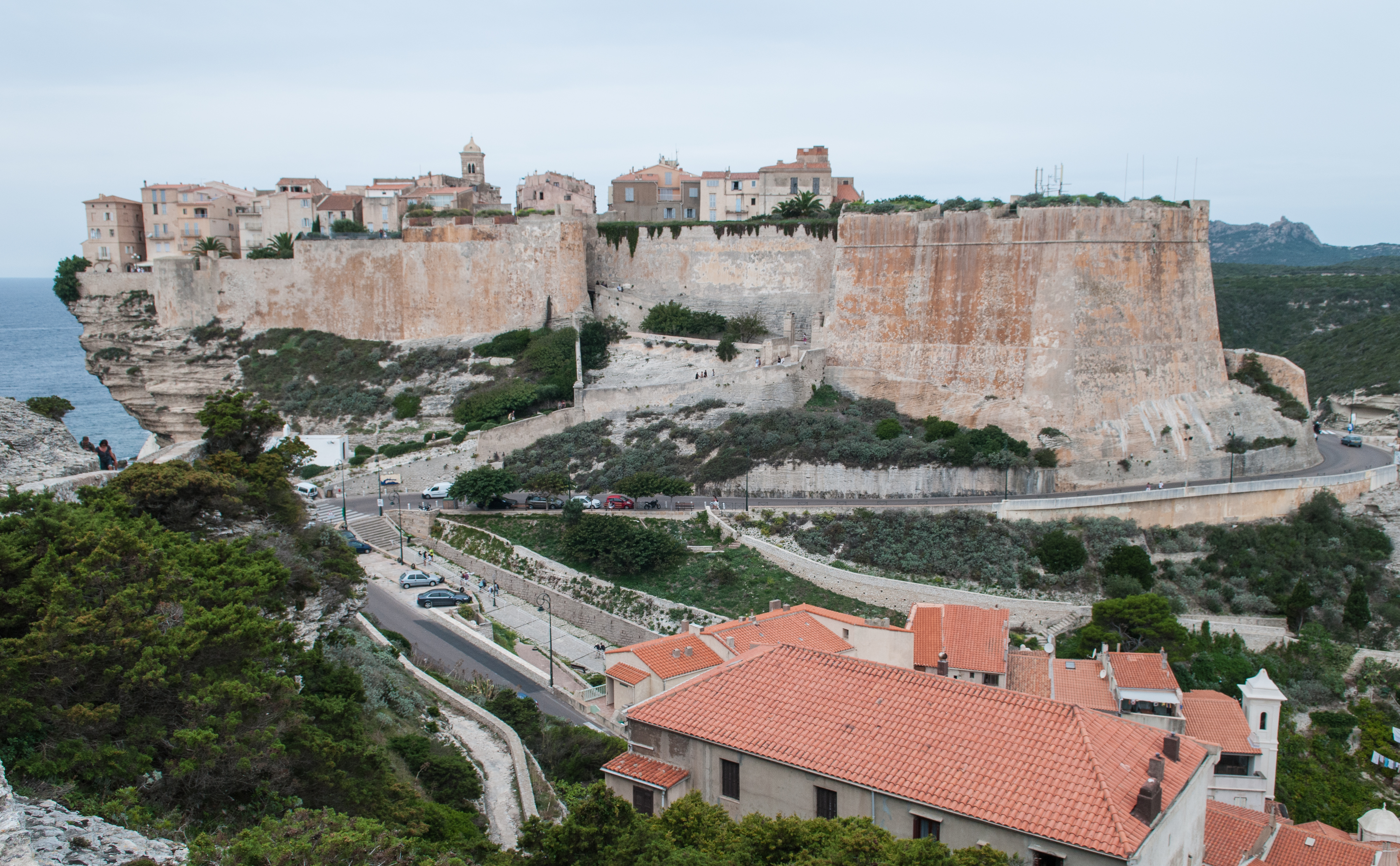 Bonifacio, Corsica